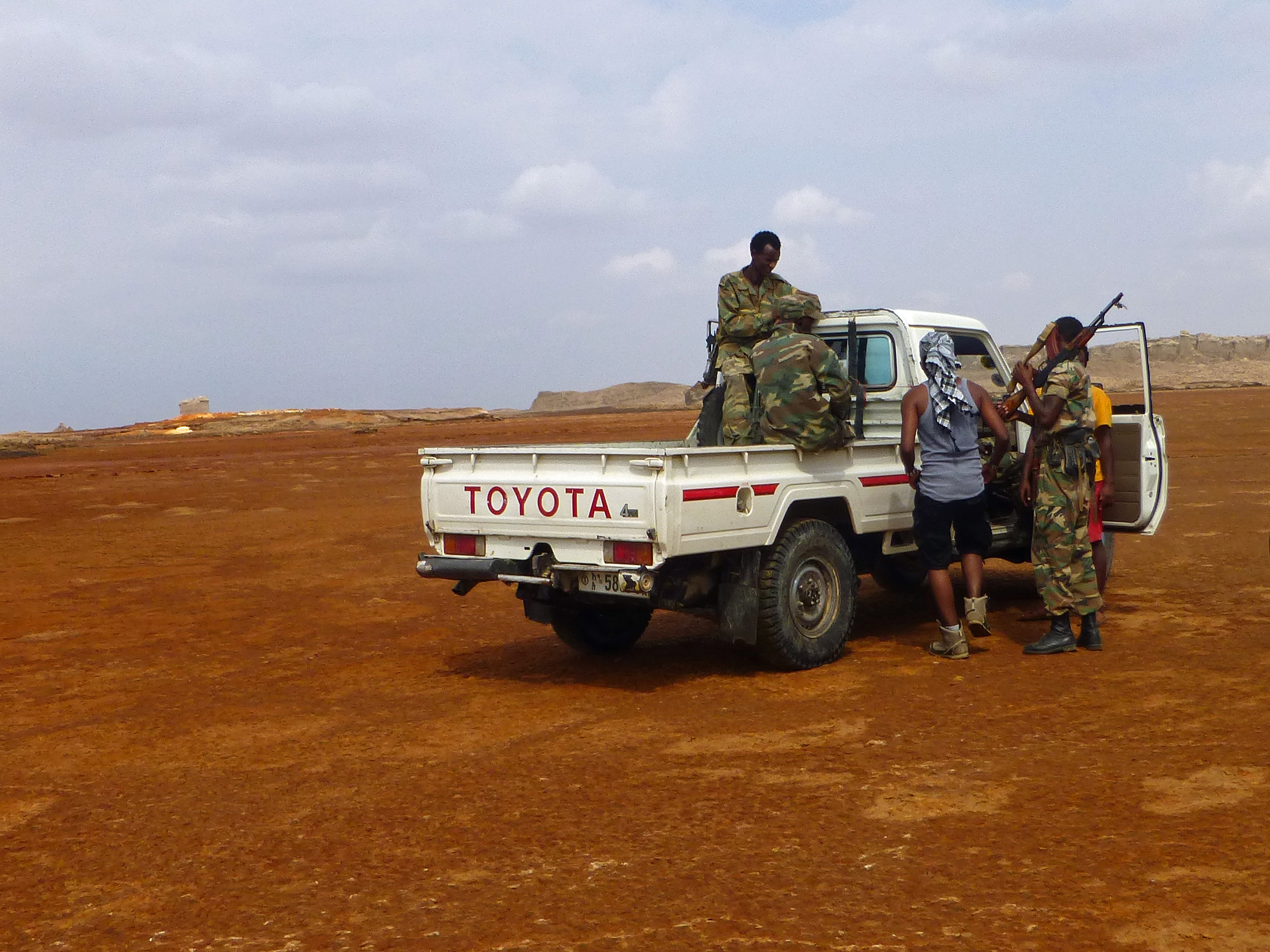 Dallol (Ethiopie, région Afar, Danakil) : au bord du lac acide